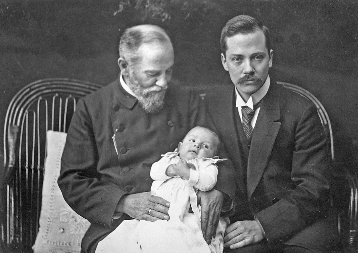 Johannes Mohn (1856 - 1930) mit Sohn Heinrich (1885 - 1955) und seinem ersten Enkel Hans-Heinrich (1913 - 1939)